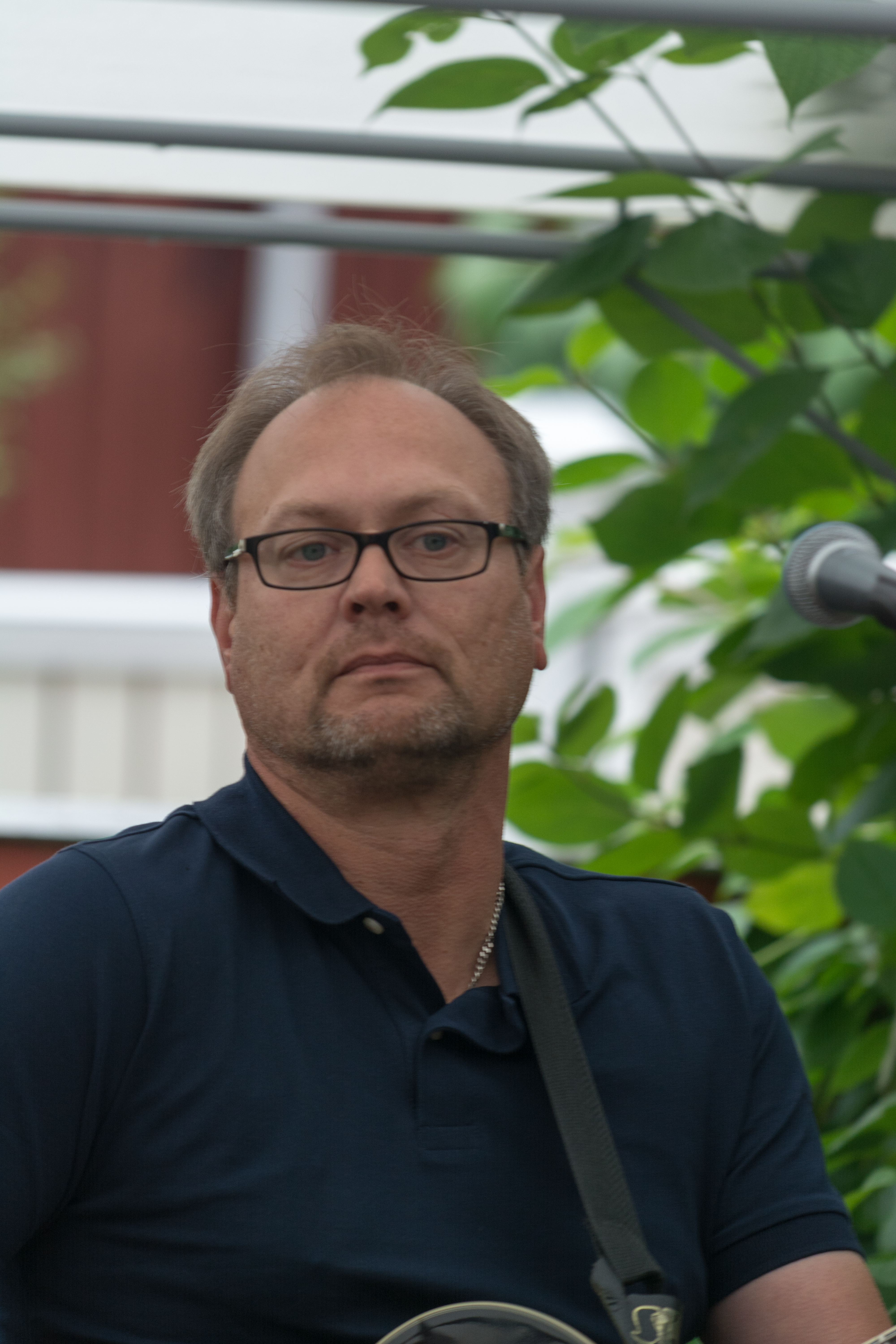 Niklas Nylynd suomalainen laulaja